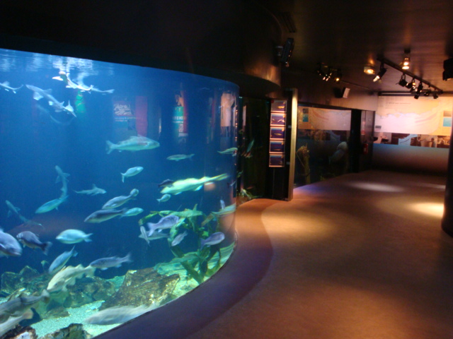 Aquarium pleine mer Maréis Etaples